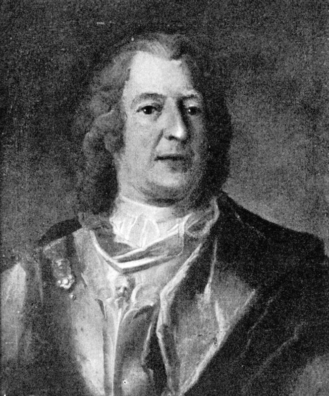 Lorentz Kristoffer Stobée (1676–1756).